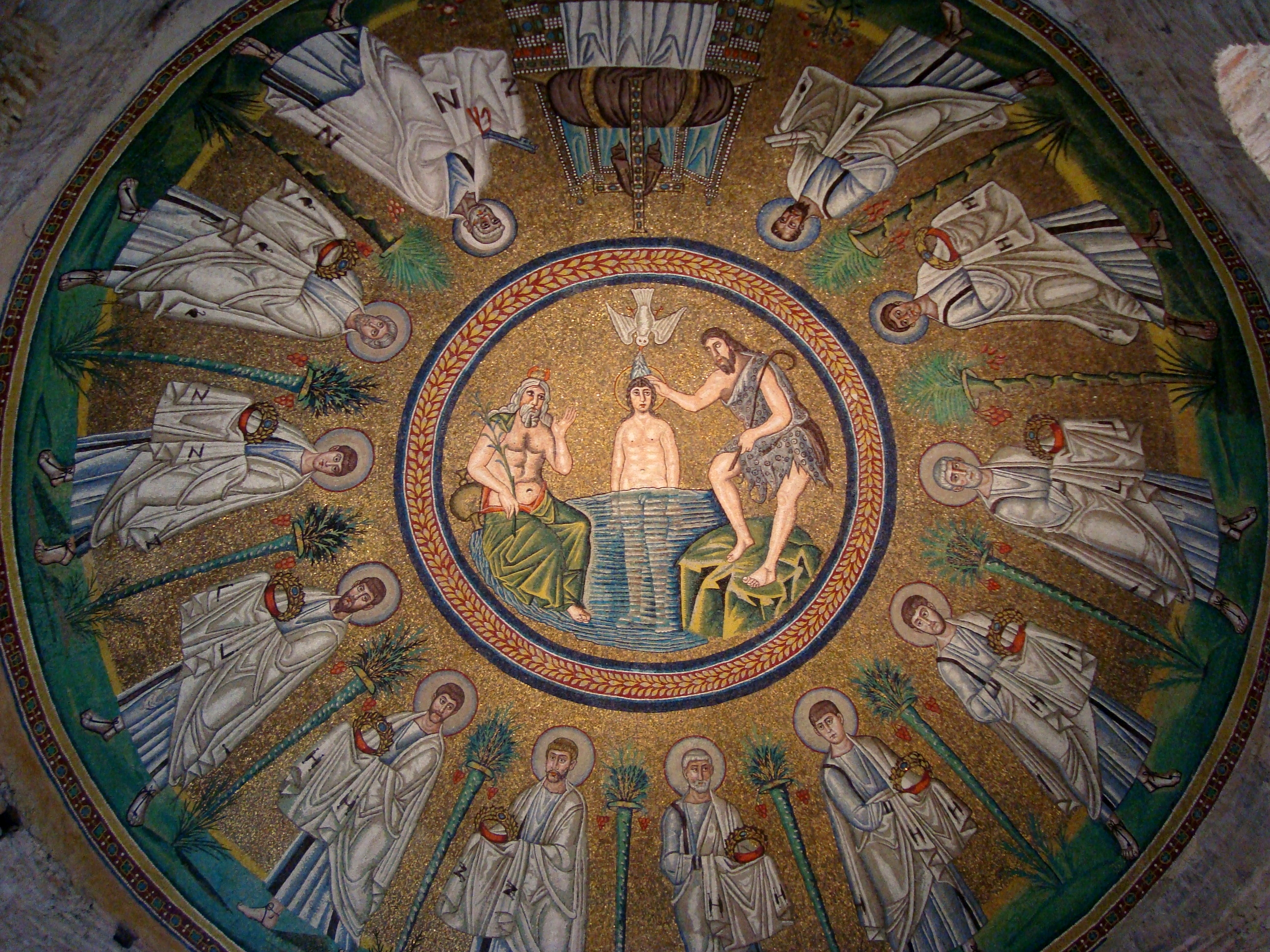 La coupole du baptistère des ariens à Ravenne (Italie)